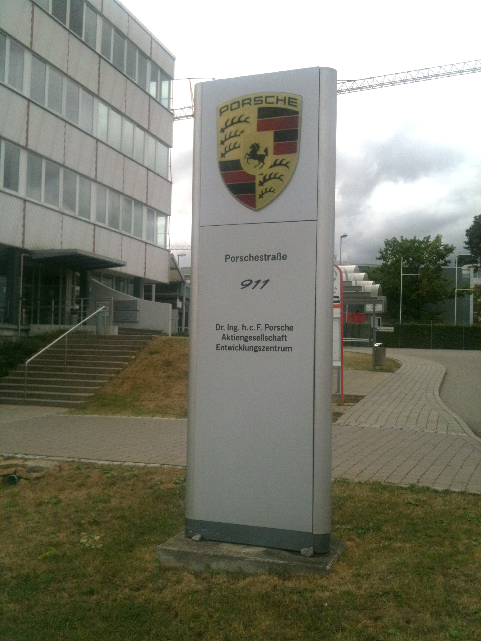 Hausnummer 911 in der Porschestraße, Weissach